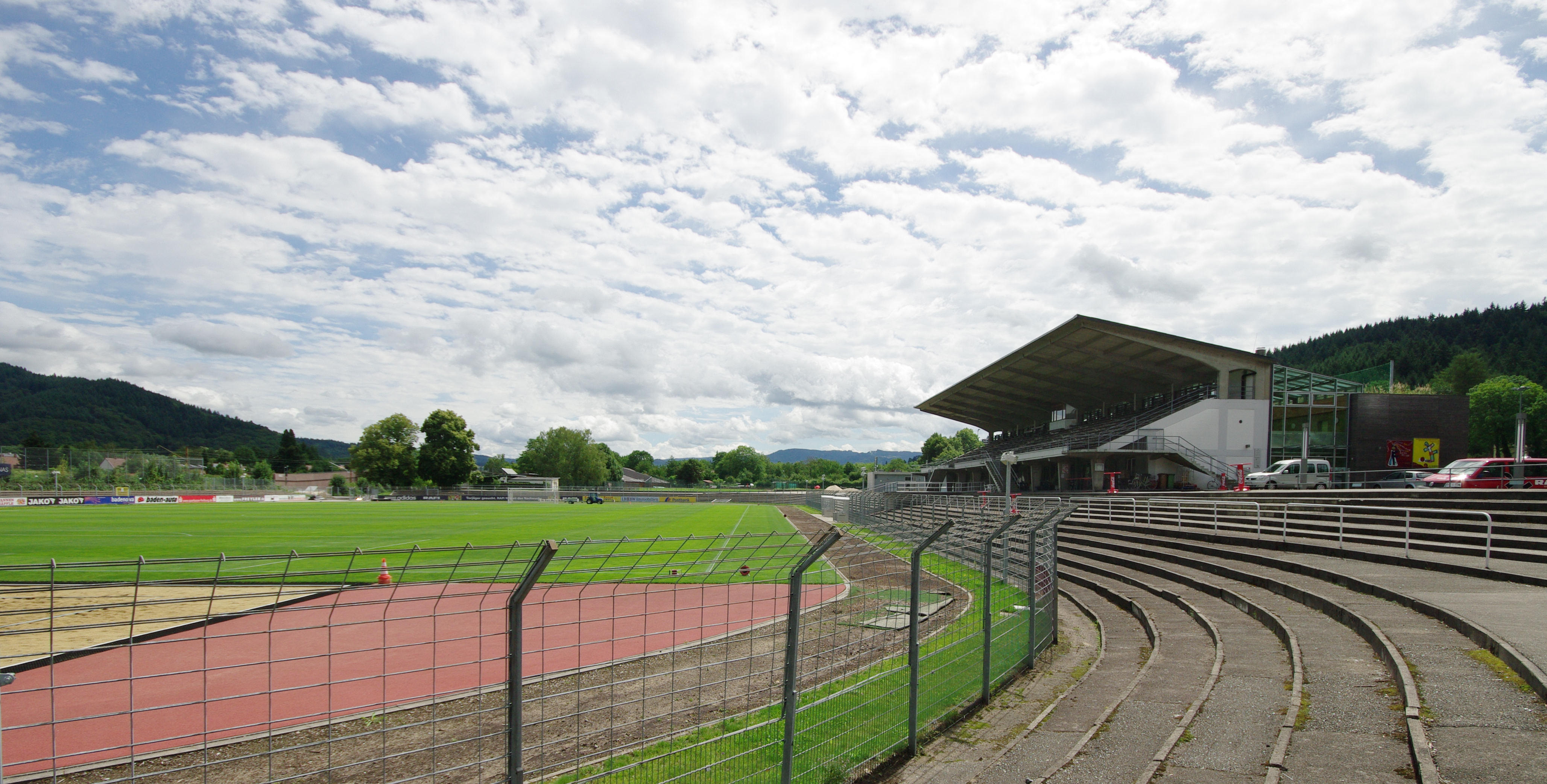 Das Mösle-Stadion in Freiburg